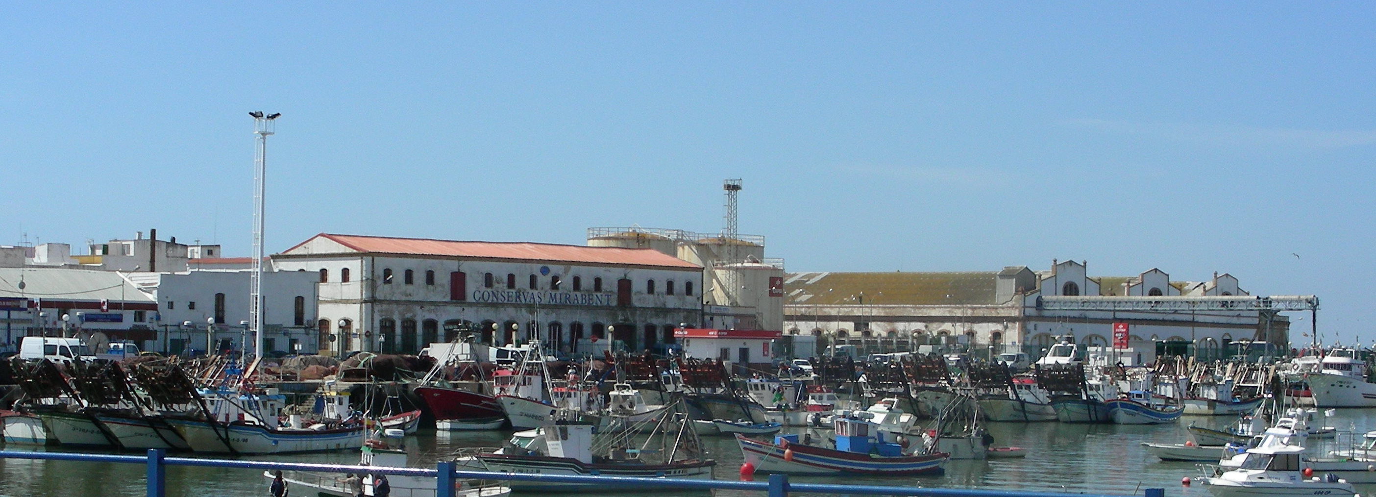 Muelle Marina de Isla Cristina y fábricas de conservas